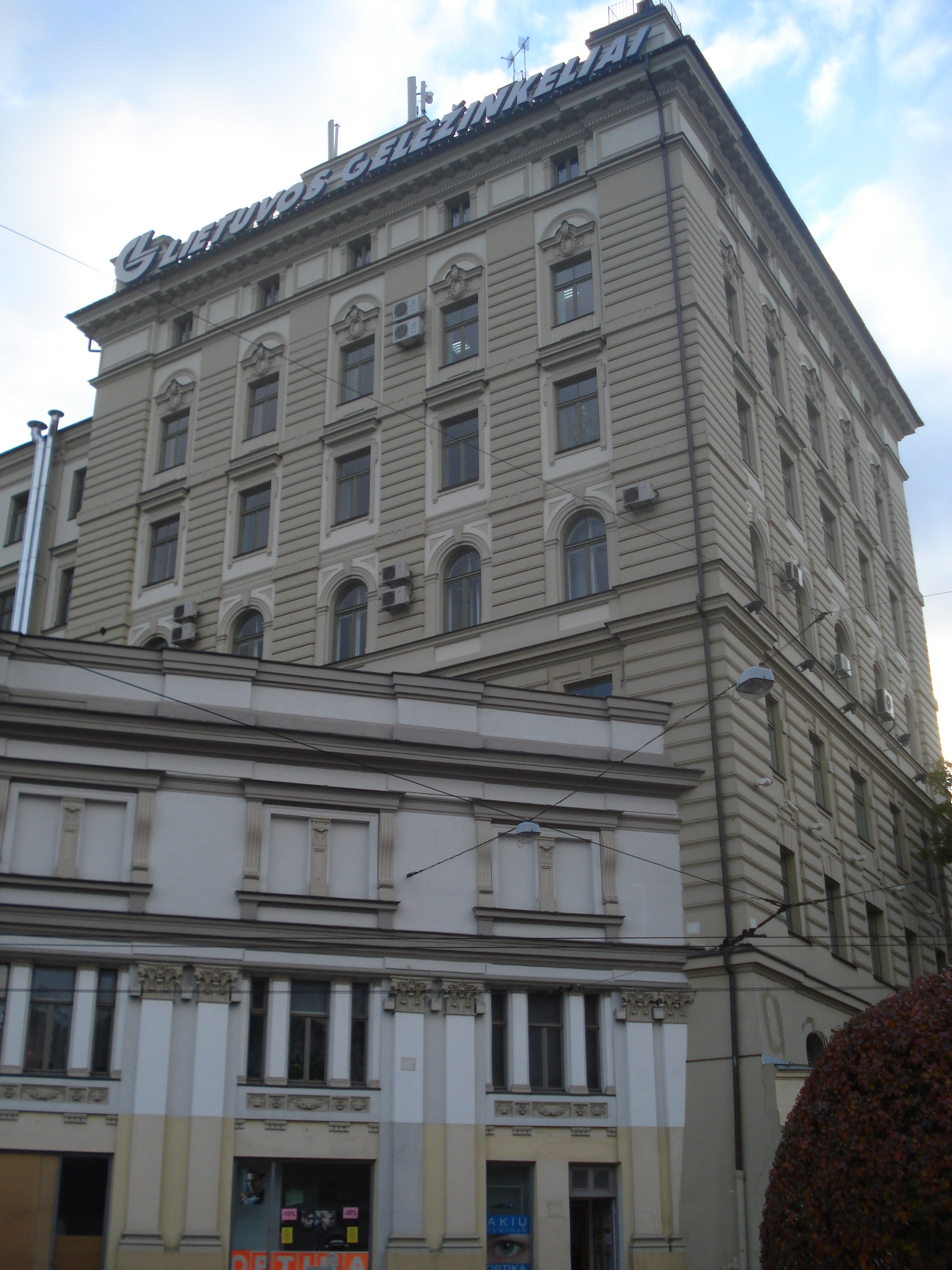 Управление Полесских железных дорог на Погулянке Polesės geležinkelio direkcijos rūmai Vilniuje (AB „Lietuvos geležinkeliai“ administracinis pastatas). J. Basanavičiaus g. 14 / Mindaugo g. 12 Headquarter of Lithuanian Railways Company in Vilnius. Architect Tadeusz Maria Rostworowski